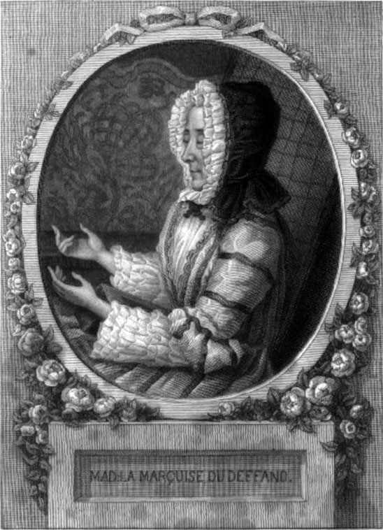 Portrait of Marie du Deffand (1697-1780)